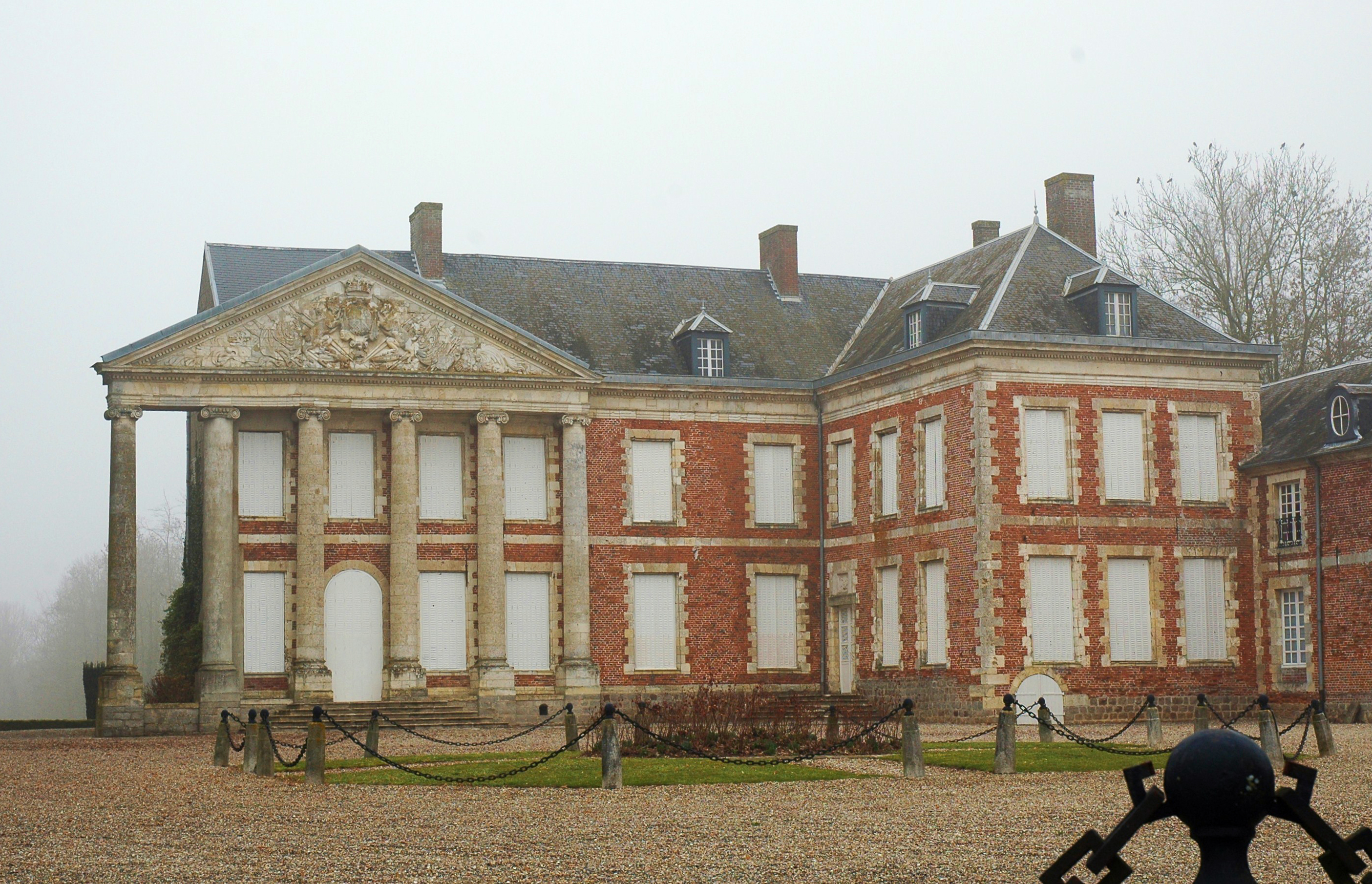 Hénencourt (Somme, France). Le château.